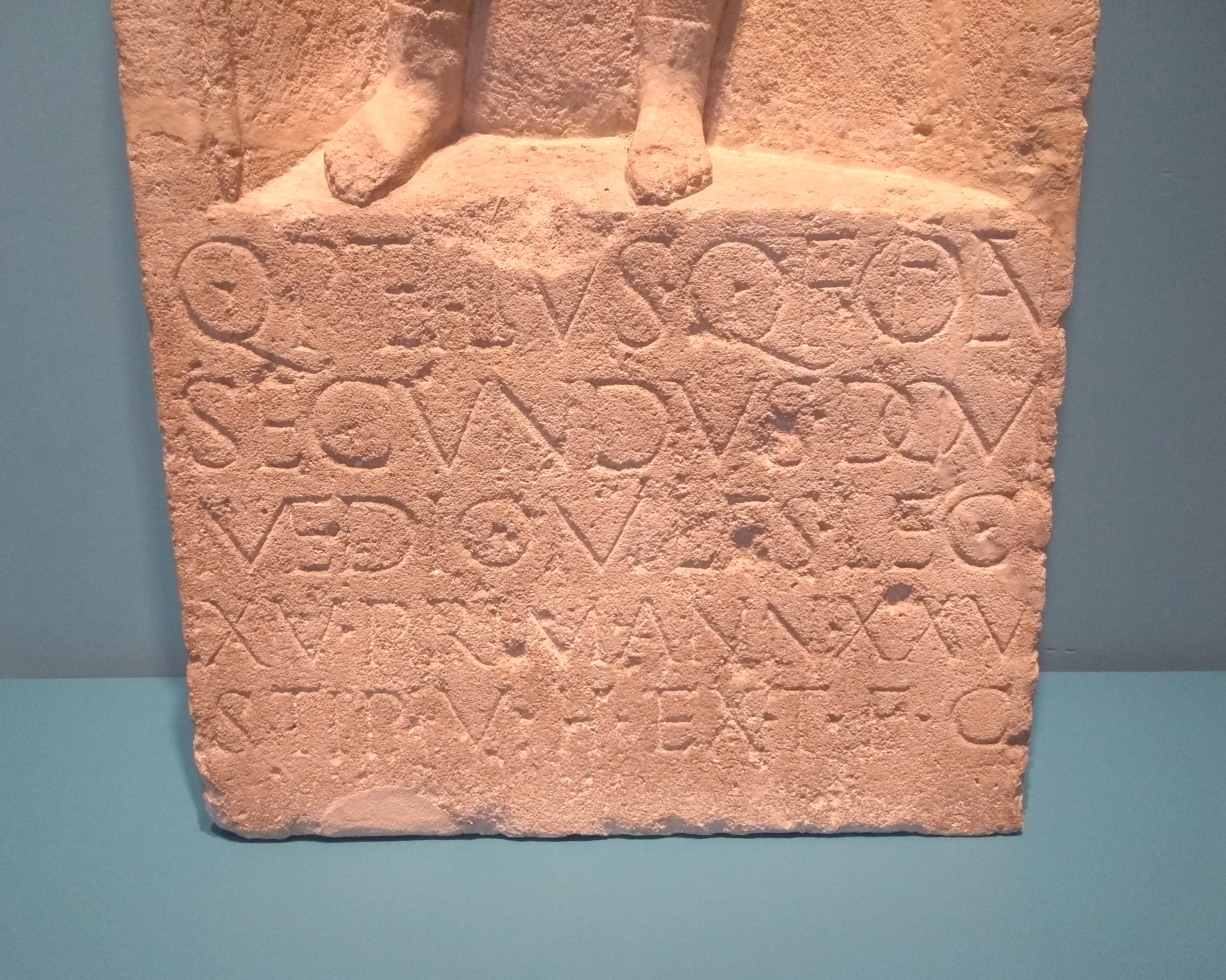 Grabstein des Quintus Petilius Secundus (CIL XIII,8079), heute im Rheinischen Landesmuseum Bonn, unterer Teil mit der Grabinschrift